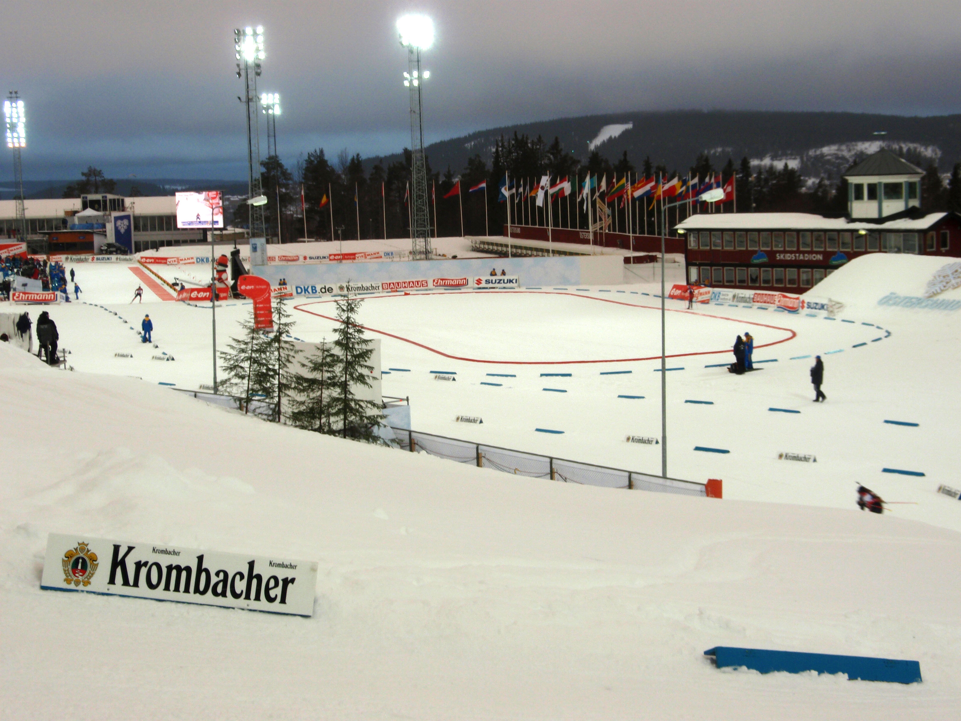 Östersunds skidstadion under skidskytte vm 2008